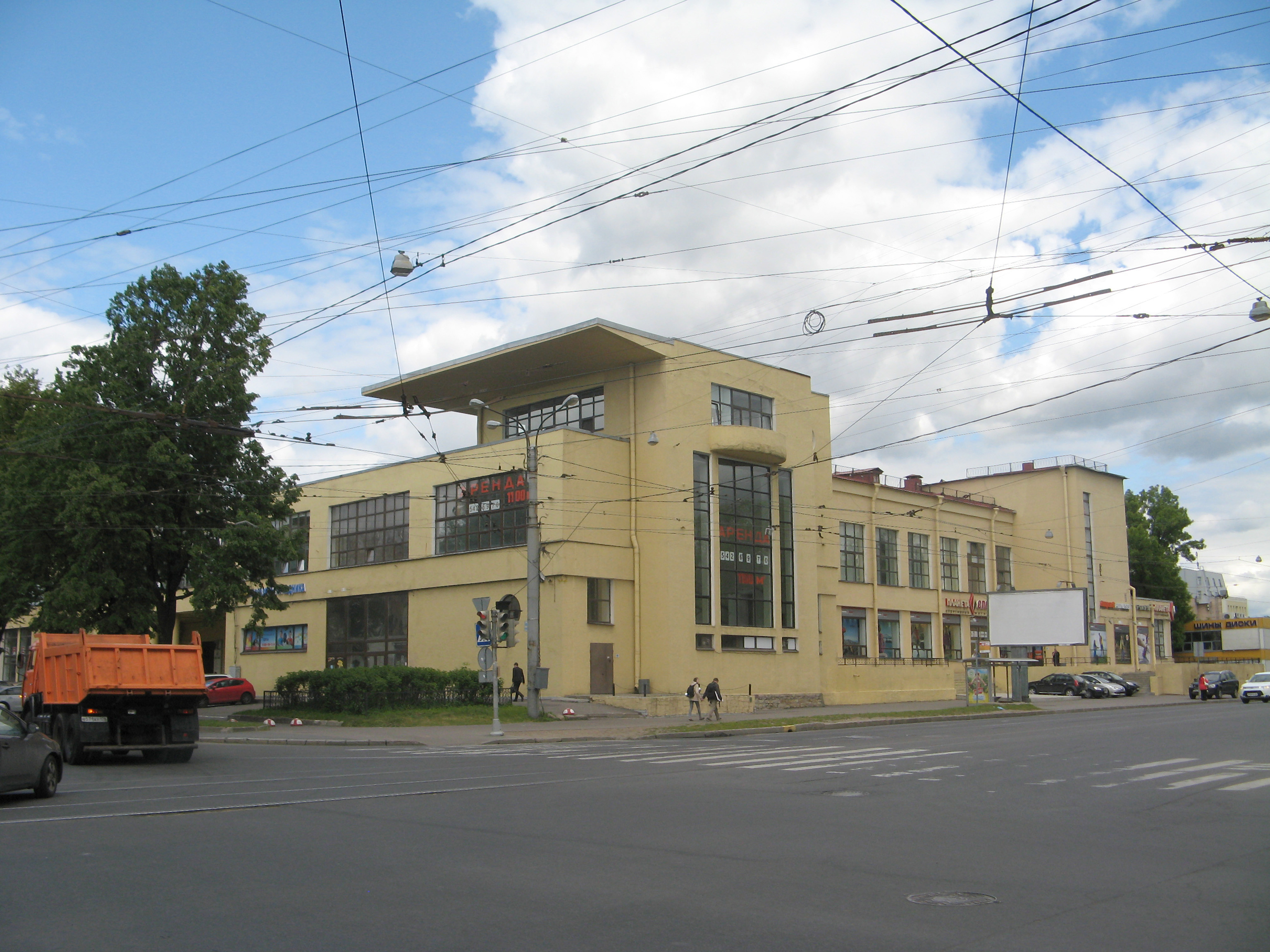 Здание Выборгской фабрики-кухни с территорией: проспект Большой Сампсониевский, 45, Выборгский район, Санкт-Петербург